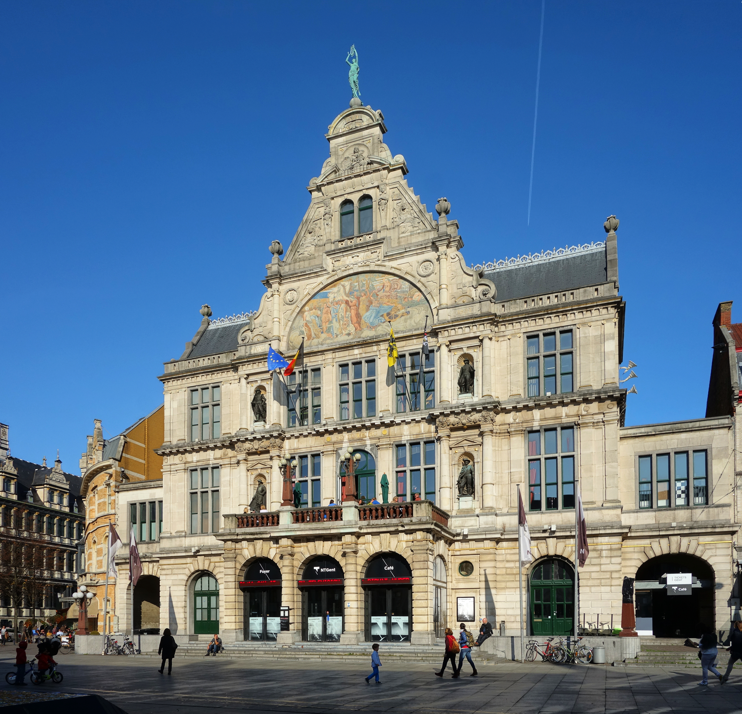 Le Nederlands Theater Gent à Gand.